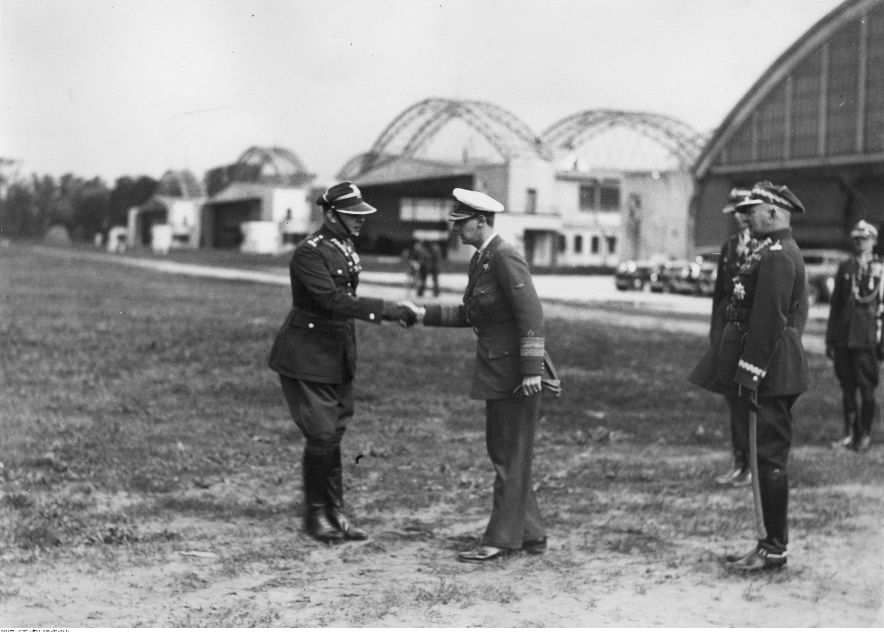 Wizyta brata króla Rumunii księcia Mikołaja w Polsce. Podpułkownik Władysław Kalkus wita księcia Mikołaja, który przybył na lotnisko wojskowe na Okęciu. Księciu towarzyszy gen. Kazimierz Fabrycy (1. z prawej). Koncern Ilustrowany Kurier Codzienny - Archiwum Ilustracji. Sygnatura: 1-D-1385-10